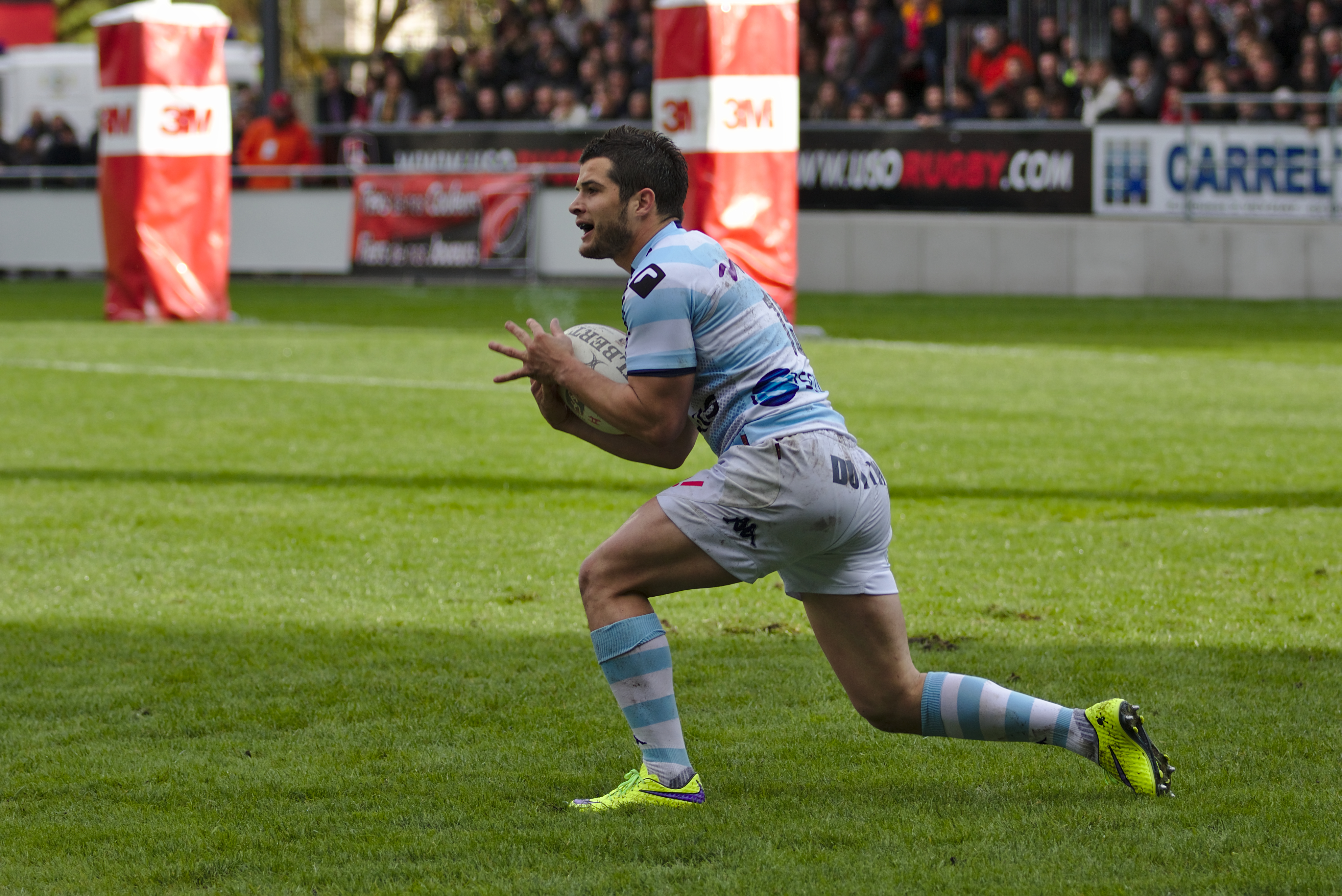 USO - RM92 - 20150425